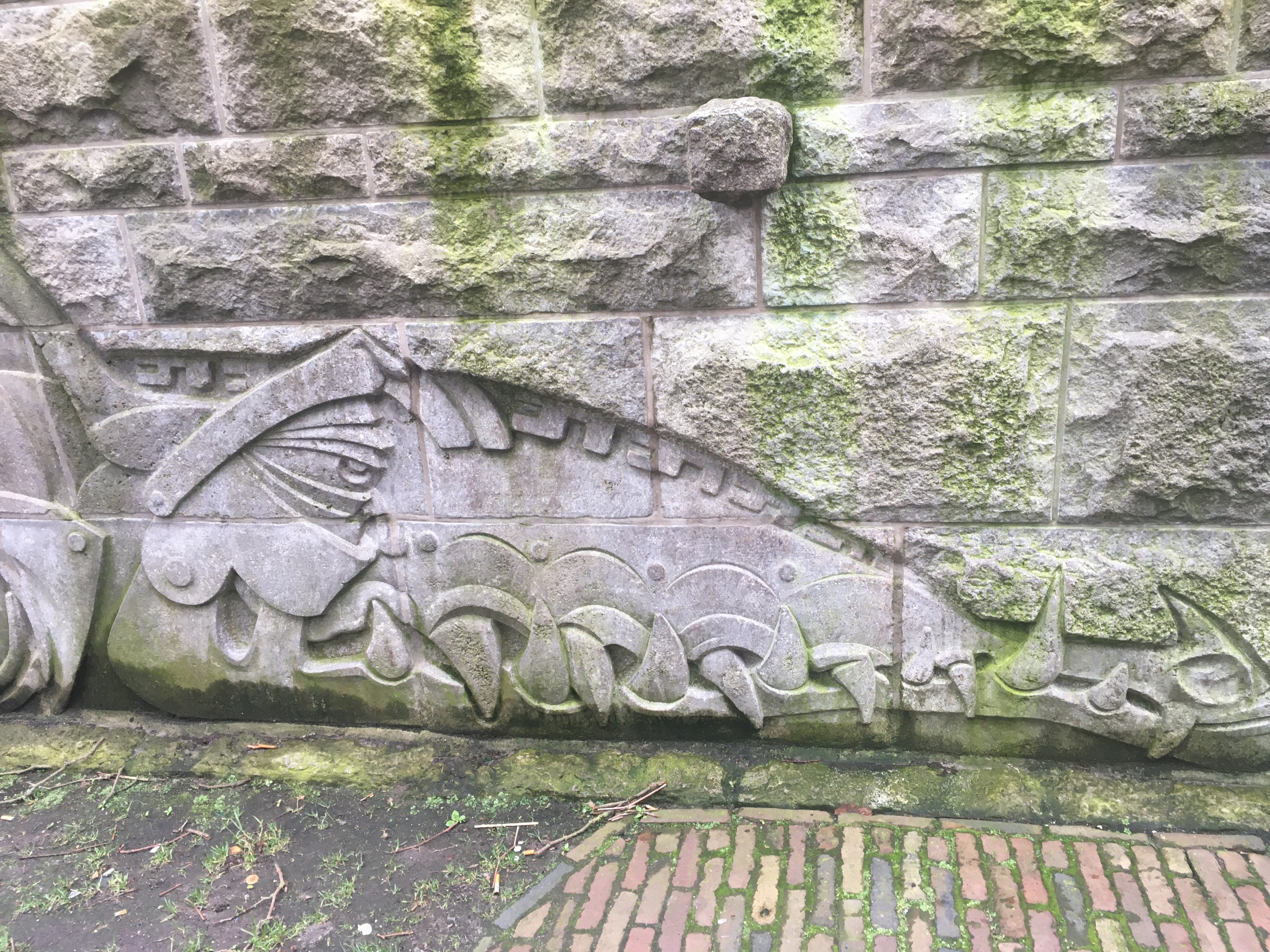 Detail van de kop van de (mechanische) draak gebeiteld in het voetstuk van het beeld van St. Joris op het Martinikerkhof in Groningen. Duidelijk zijn de swastika's op de neus van de draak te zien. Ook zie je (in de kaak) tekenen dat de draak een mechanische draak is.